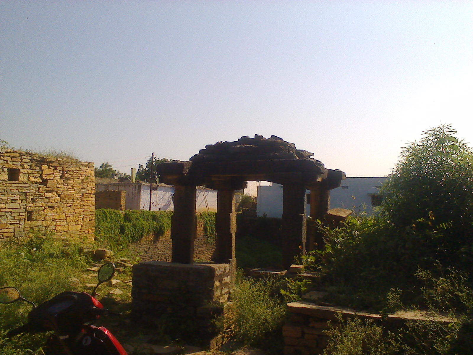 కోనేటి దగ్గరి మండపం